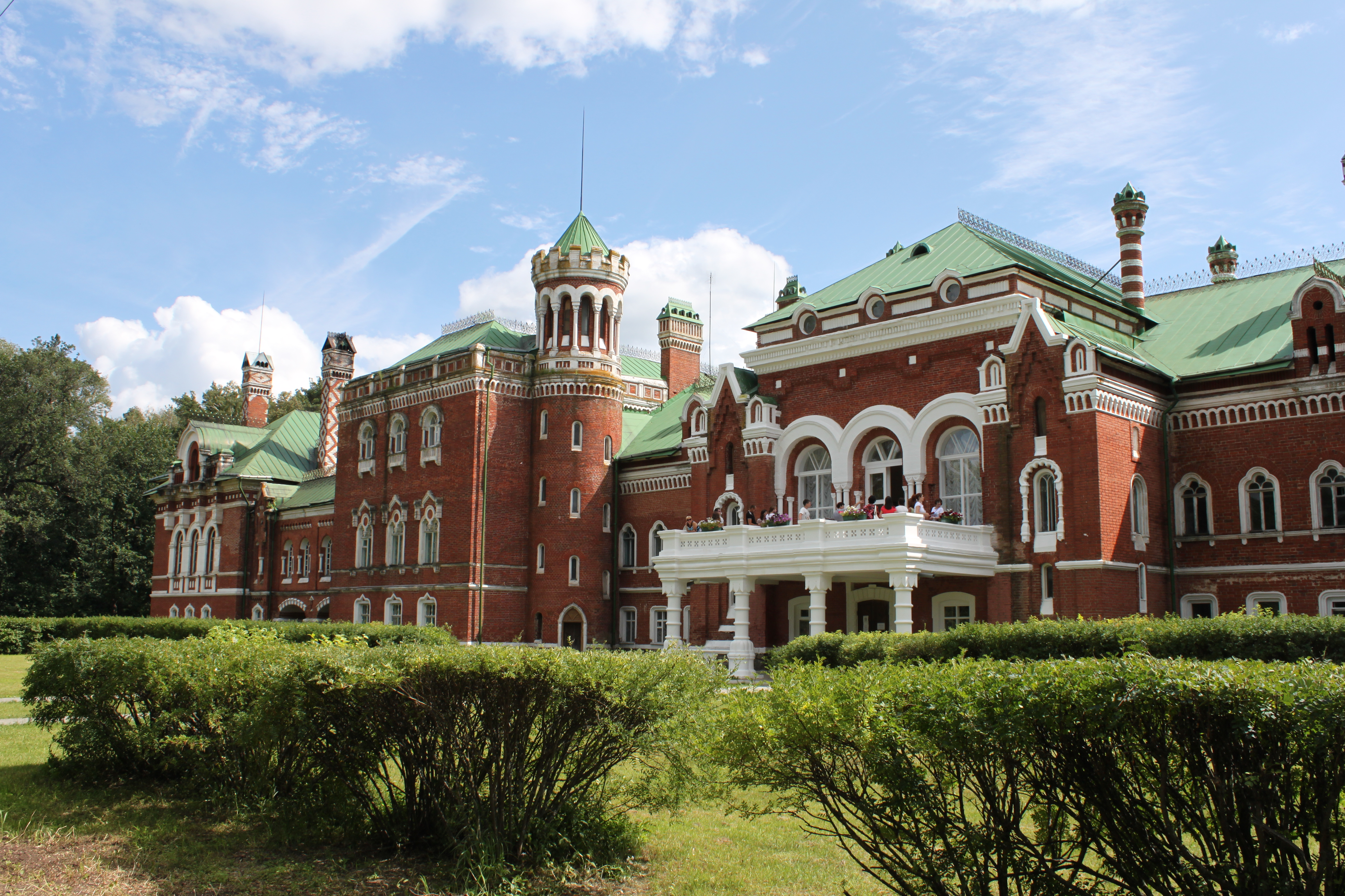 Юринский замок и усадьба Шереметевых: Юрино, Юринский район, Марий Эл